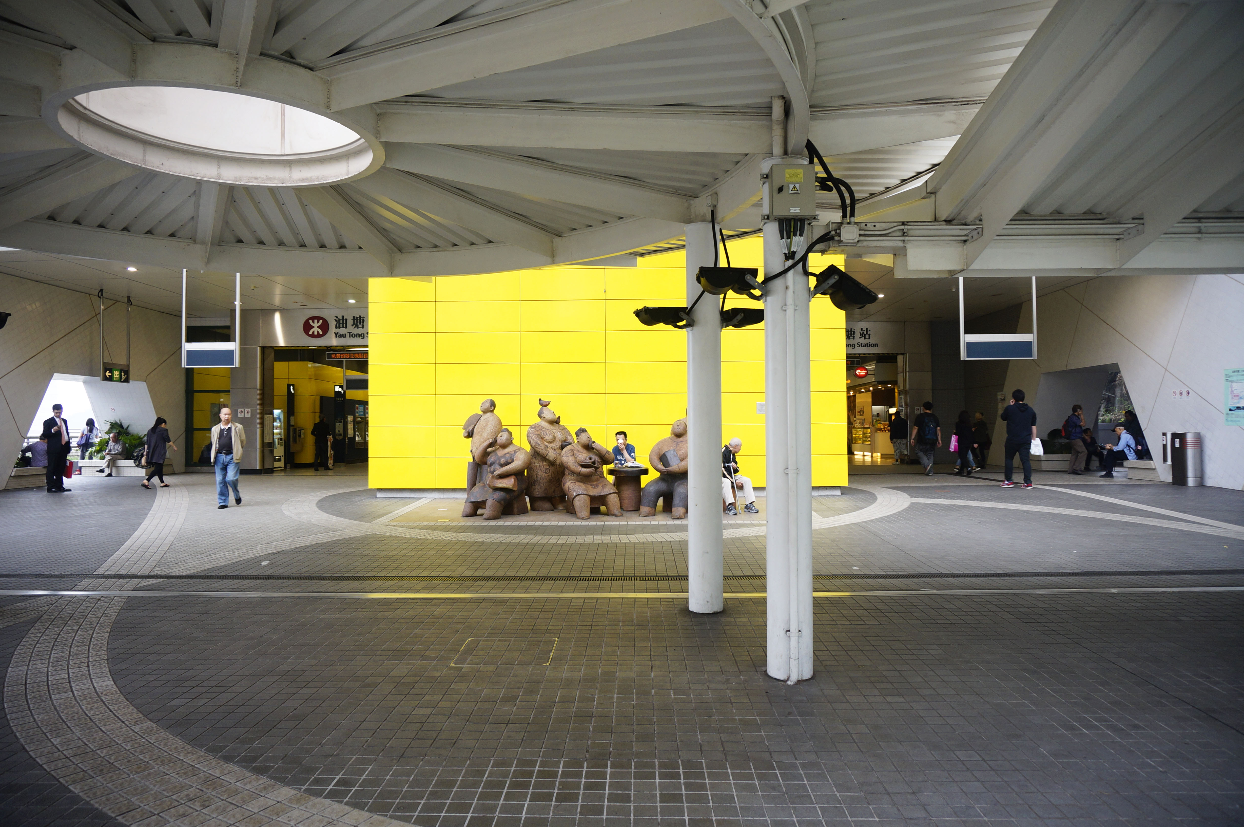 港鐵油塘站A出入口